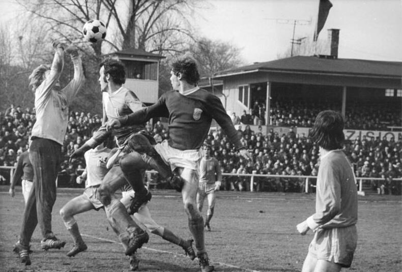 ADN-ZB-Liebers-5-4-75-ma-Bez.Gera: Fußball-Oberligaspiel FC Carl-Zeiss Jena - FC Rot-Weiß Erfurt 1:0- Torwart Fischer (1.) klärt durch Faustabwehr. Während Verteidiger Menge (r.daneben-beide Erfurt) seinem Schlußmann zur Hilfe kommt, hat Klaus Schröder (Jena- 3.v.l.) das Nachsehen.